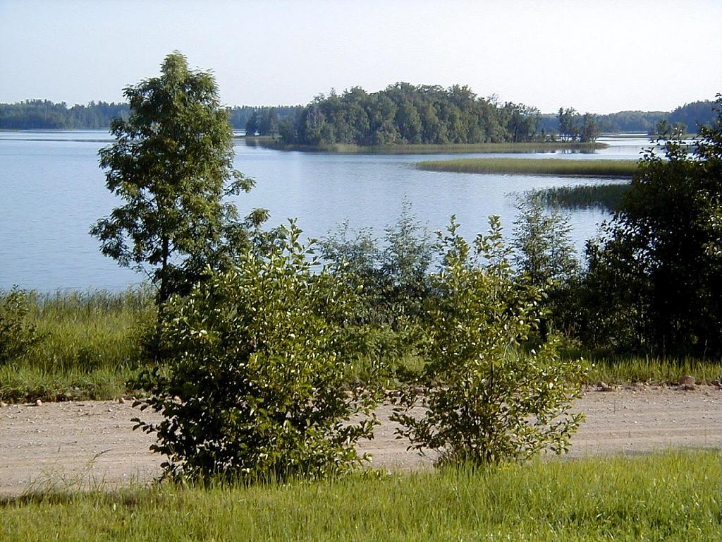 Ežezers pie Ezernieku - Andzeļu ceļa 2004-08-05